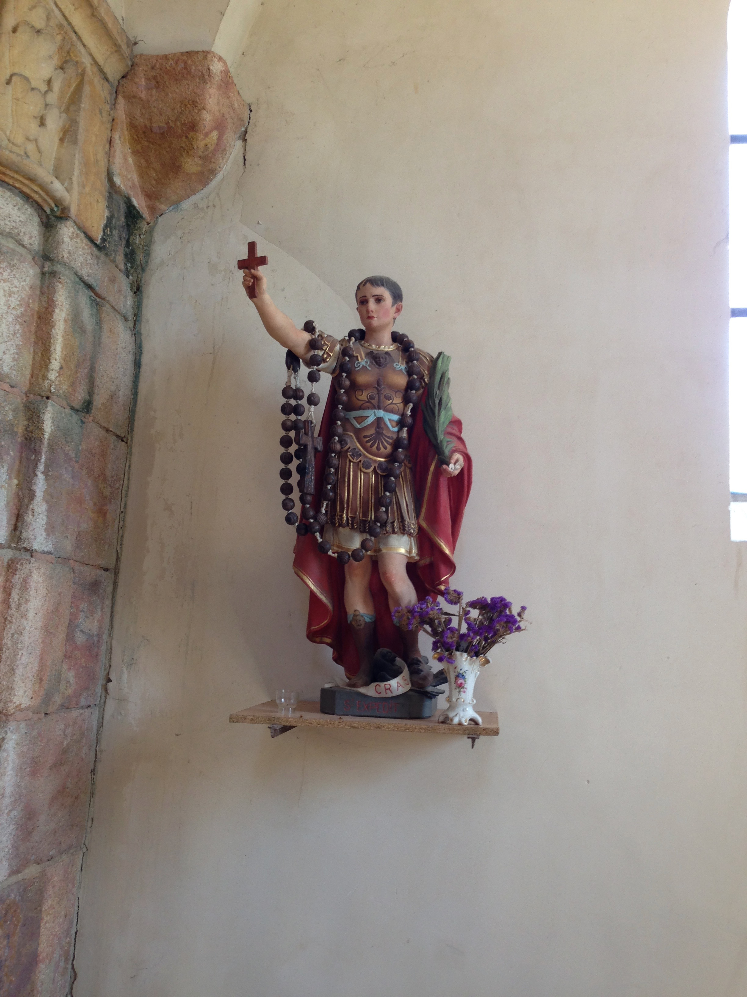 Saulzais-le-Potier Statue de saint Expédit